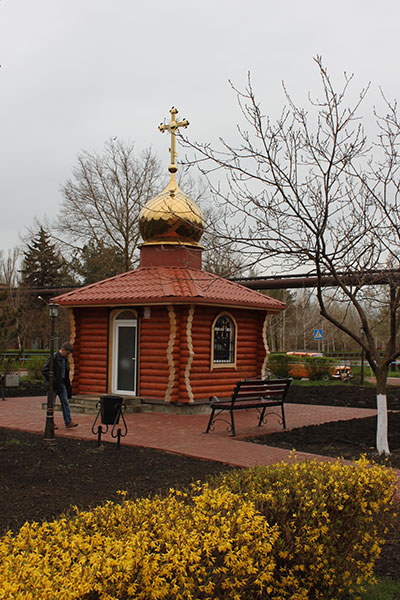 часовня св.Варвары